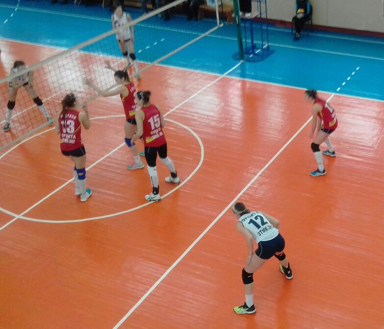 Волейбольний клуб "Орбіта-ЗТМК-ЗНУ"